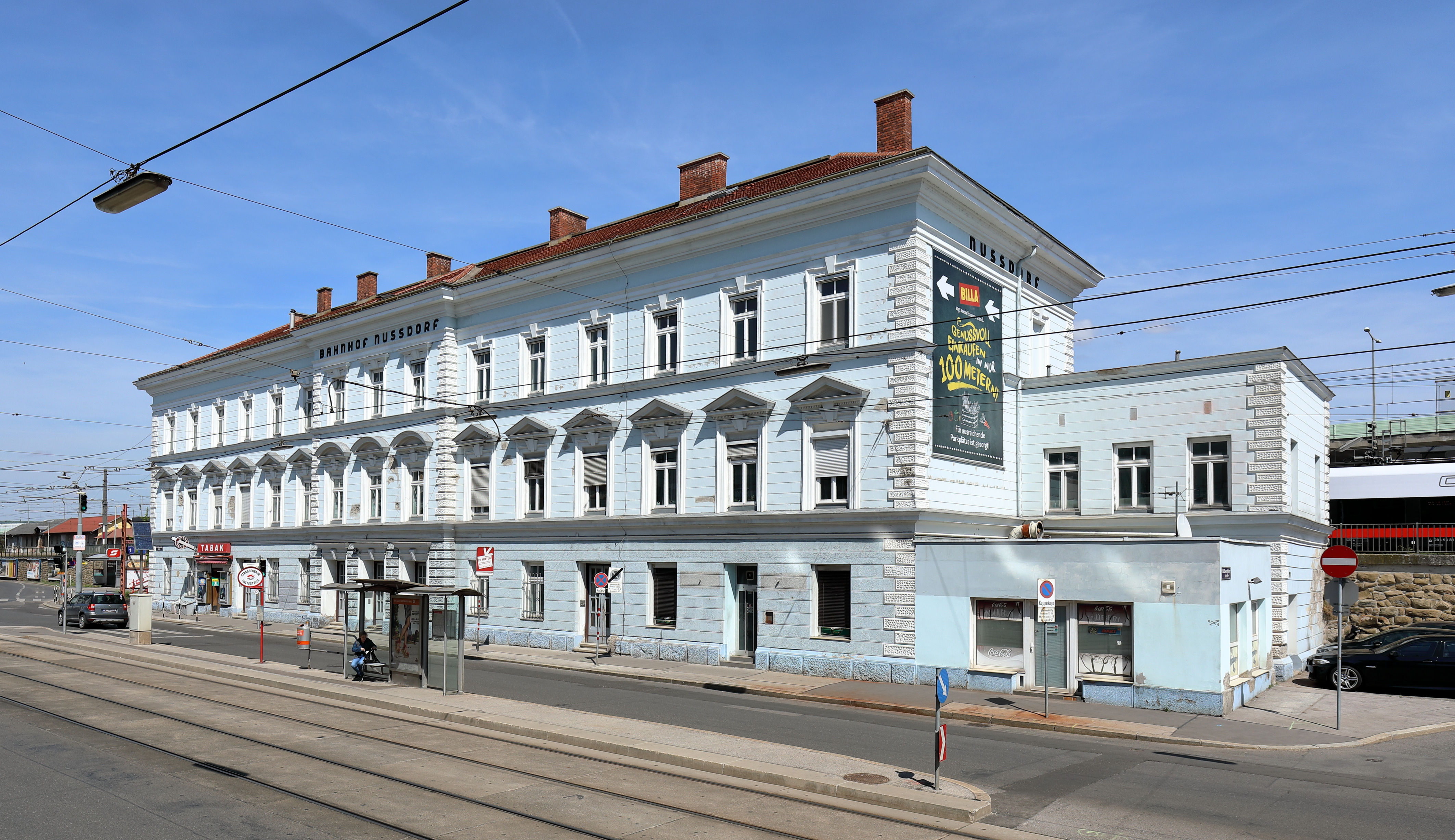 Der Bahnhof Wien Nussdorfl in Nussdorf, ein Ortsteil des 19. Wiener Gemeindebezirkes Döbling. Der Bahnhof wurde im Zuge des Baues der Franz-Josefs-Bahn errichtet und gleichzeitig mit der Inbetriebnahme der Bahn am 23. Juni 1870 eröffnet. 1900 ersetzte man das ursprüngliche Aufnahmegebäude wurde durch einen großzügigen Neubau.